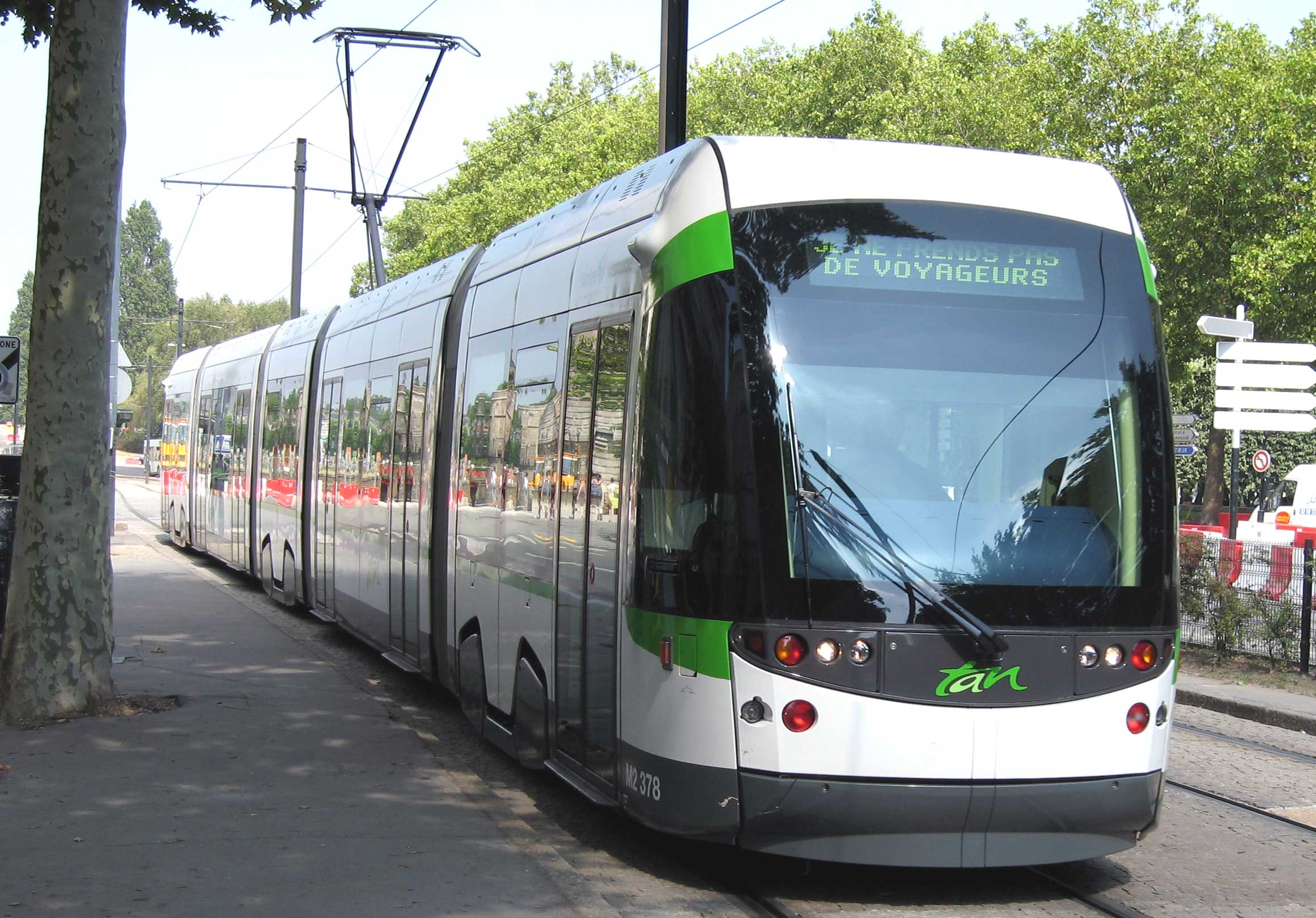 Description : Tramway de Nantes Place : Nantes, France Date : 2006 Author : Pline Schéma ou photo personnelle